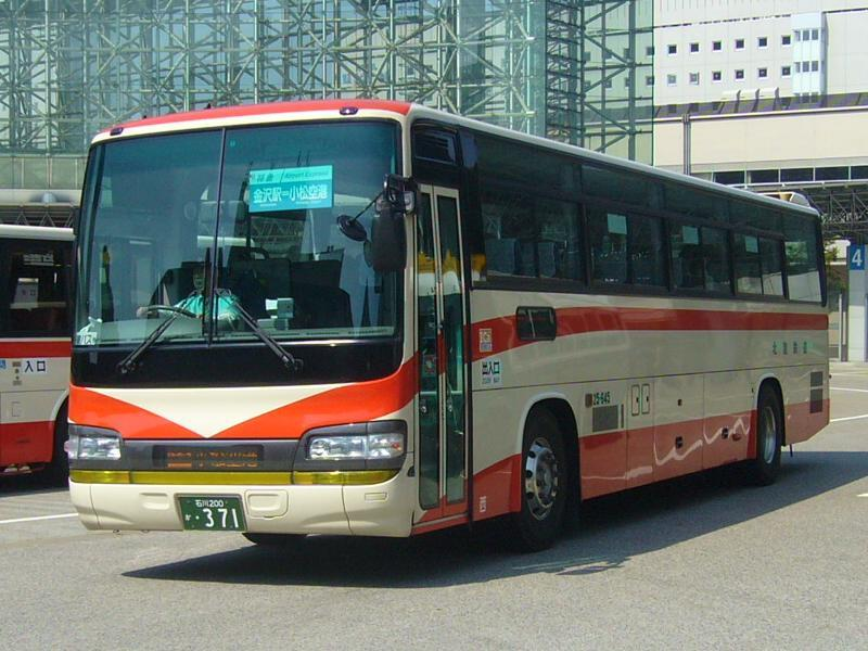 登録番号 石川200か・371 北陸鉄道所属 小松空港リムジン用 2007年4月7日 金沢駅前にて撮影